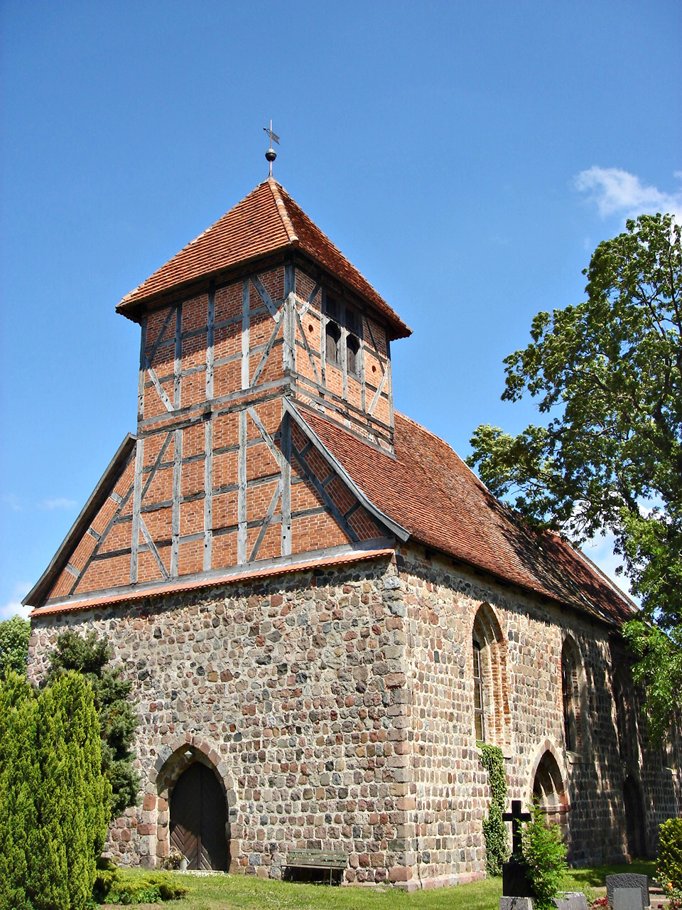 Dorfkirche von Brohm, Stadtteil von Friedland, Landkreis Mecklenburgische Seenplatte, Mecklenburg-Vorpommern.